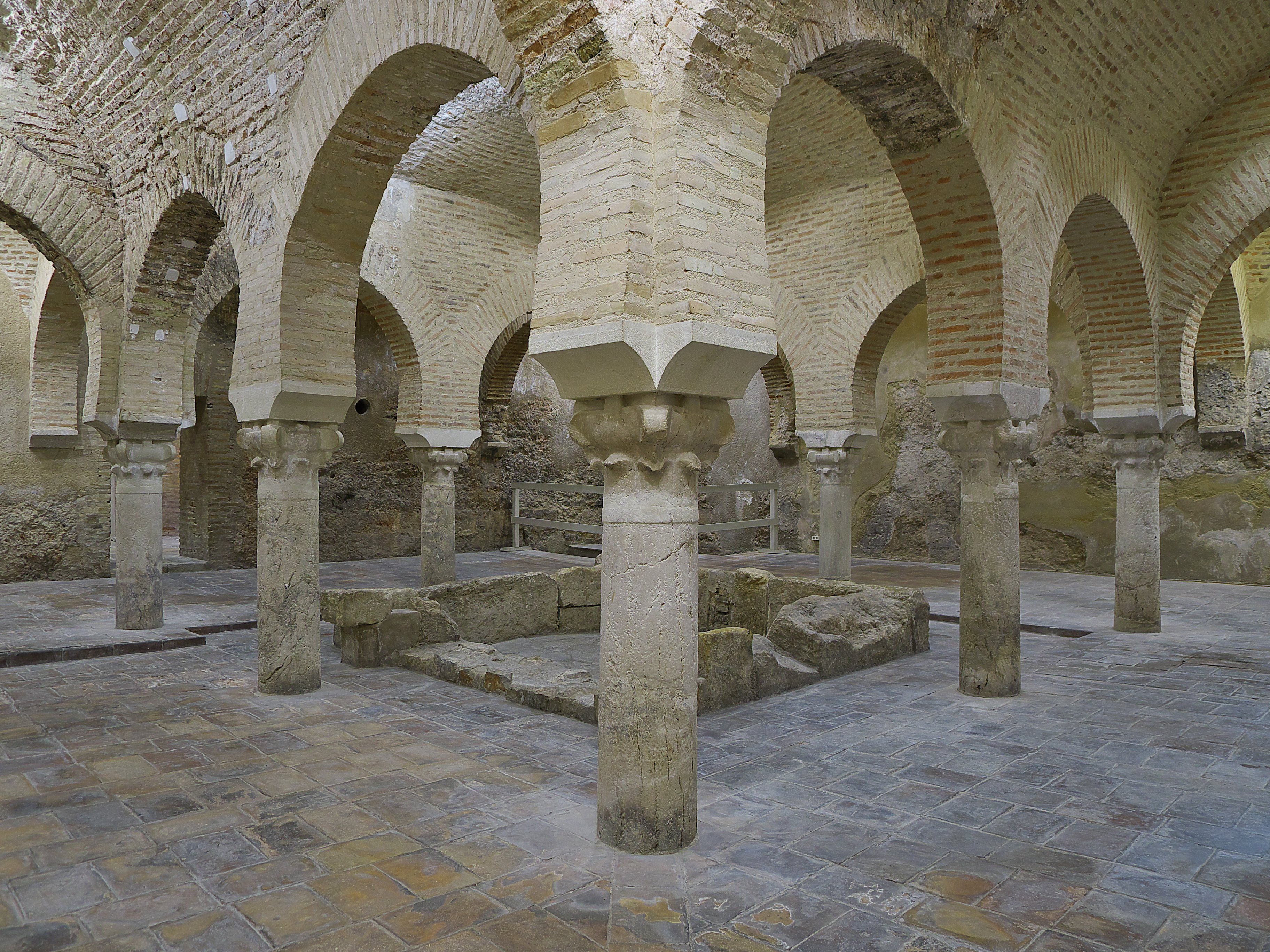 Al-bayt al-wastani. Sala templada de los Baños árabes de Yayyan (s. XI) de considerables dimensiones, más de ciento veinte metros cuadrados. Posiblemente en tiempo del reyezuelo Alí (†1002)